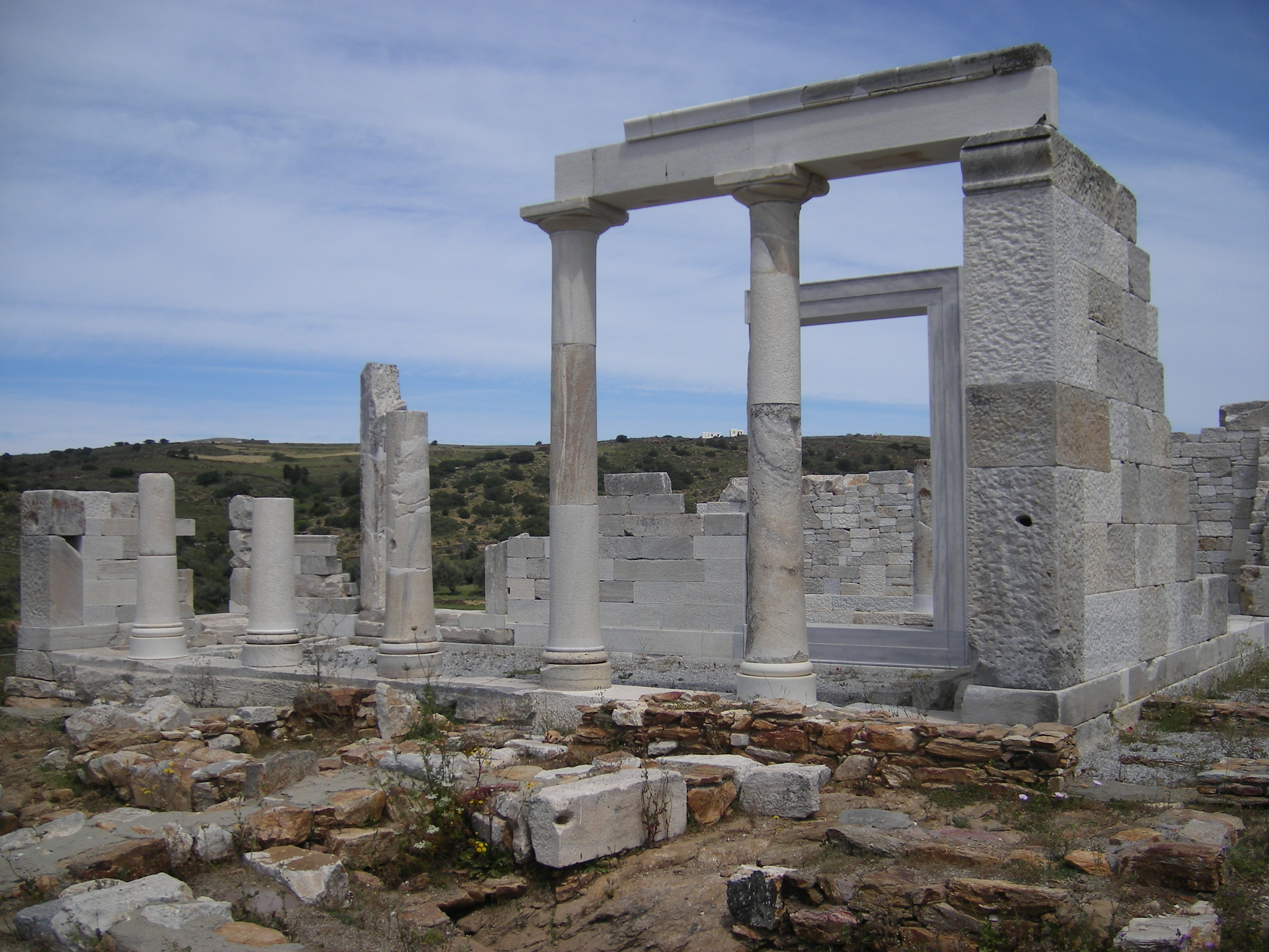 Demeter Temple, Sagri, Naxos